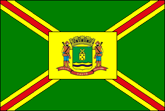 Bandeira instituída em 29/01/1971 pela Lei Municipal n° 997/71